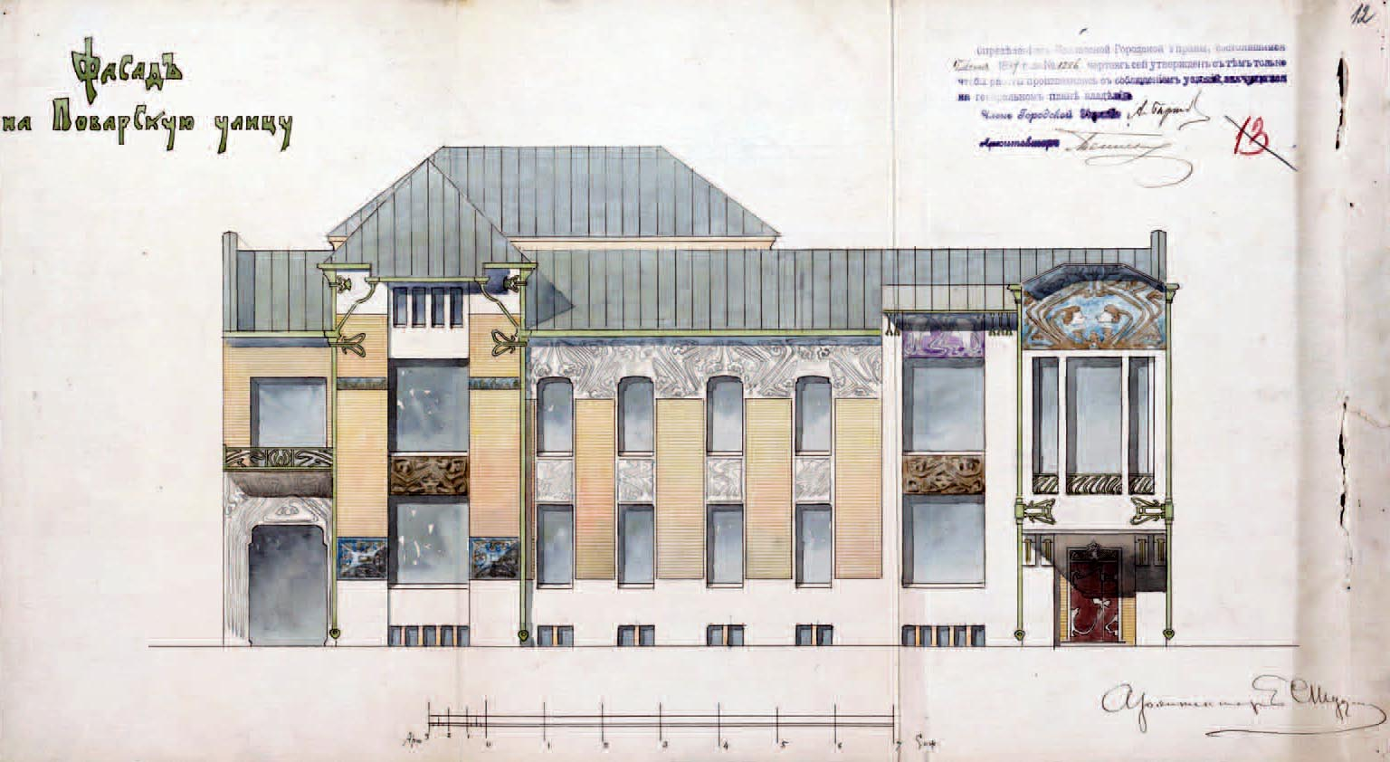 Эскиз фасада особняка М. С. Саарбекова на Поварской улице в Москве (не осуществлён)